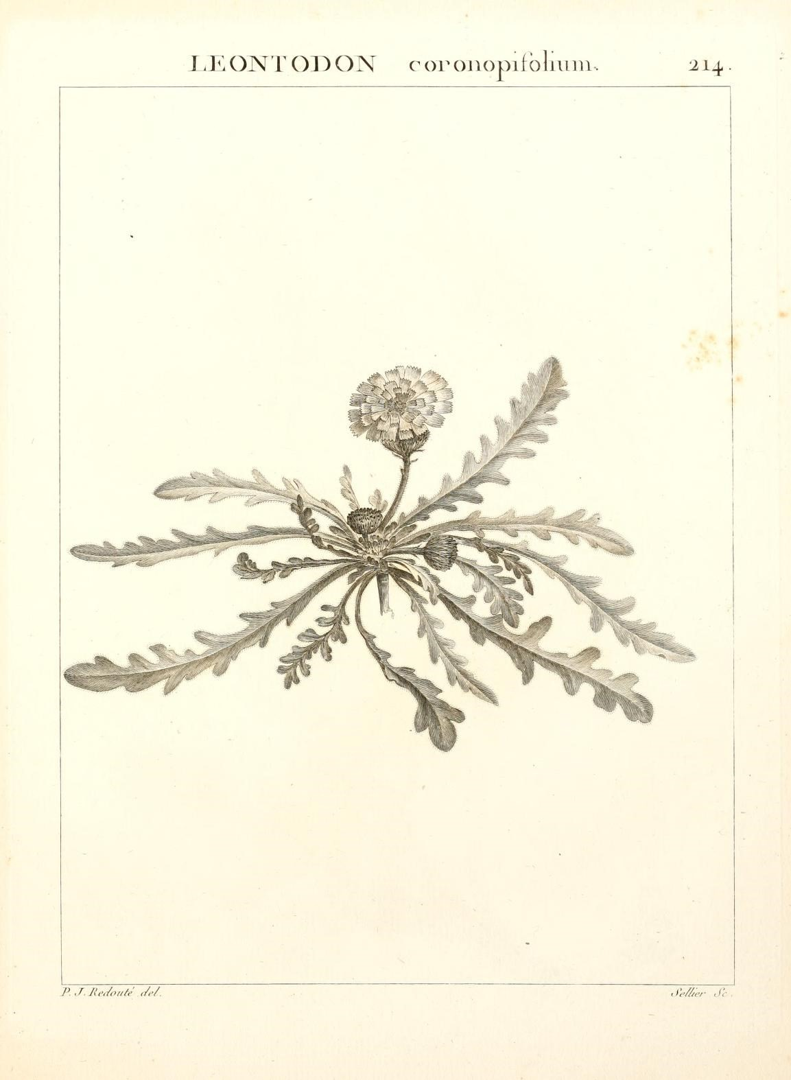 JJRIONTODON coronopifblium.. 214 P.J.Redoute ,/.■/. .)W/,er Jc